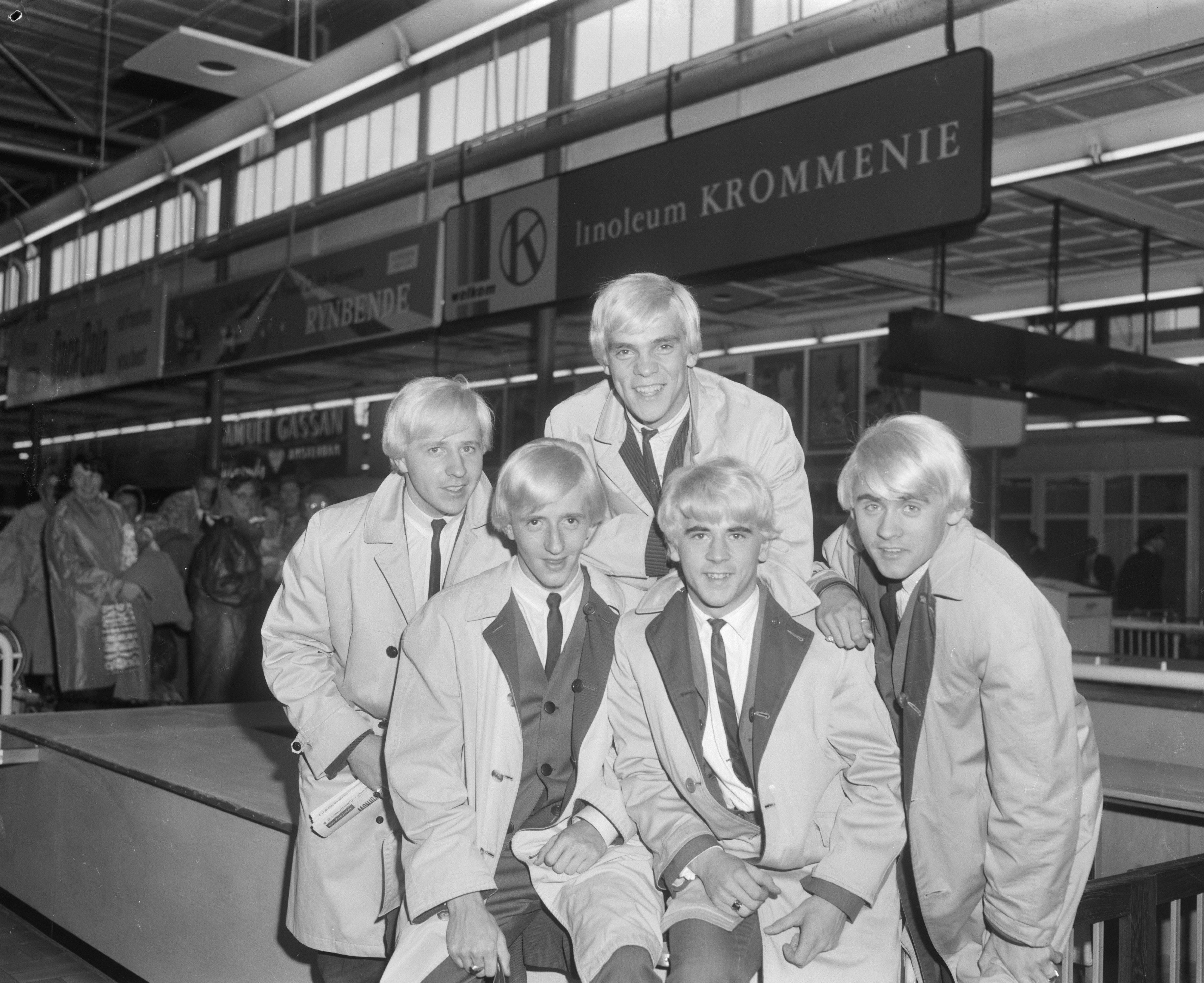 Collectie / Archief : Fotocollectie Anefo Reportage / Serie : [ onbekend ] Beschrijving : Aankomst Les Tetes Blanches op Schiphol, zij komen uit Quebec (Canada) zangroep, Les Tetes Blanches Datum : 13 oktober 1964 Locatie : Noord-Holland, Schiphol Trefwoorden : aankomsten Fotograaf : Bilsen, Joop van / Anefo Auteursrechthebbende : Nationaal Archief Materiaalsoort : Negatief (zwart/wit) Nummer archiefinventaris : bekijk toegang 2.24.01.04 Bestanddeelnummer : 917-0056